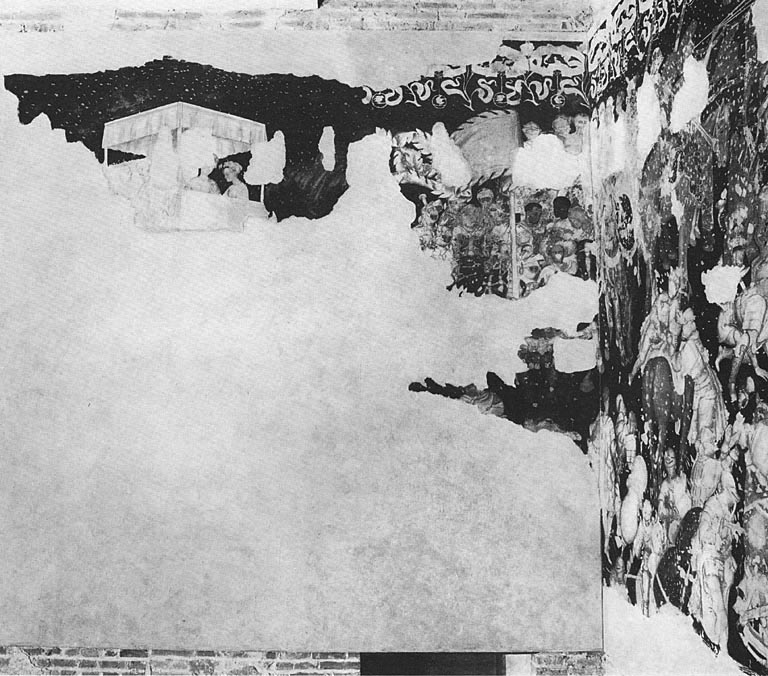 pisanello, Torneo-battaglia di Louverzep in the Palazzo Ducale, Mantua